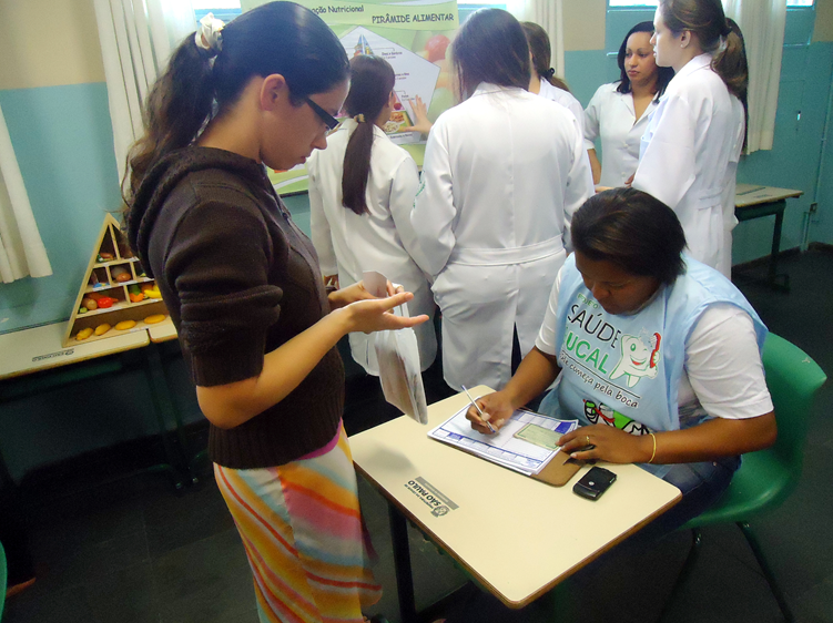 Projeto Saude Bucal, programa oferecido pelo Hospital Adventista de São Paulo, com finalidade de educar a população carente da importancia dos cuidados com a boca.